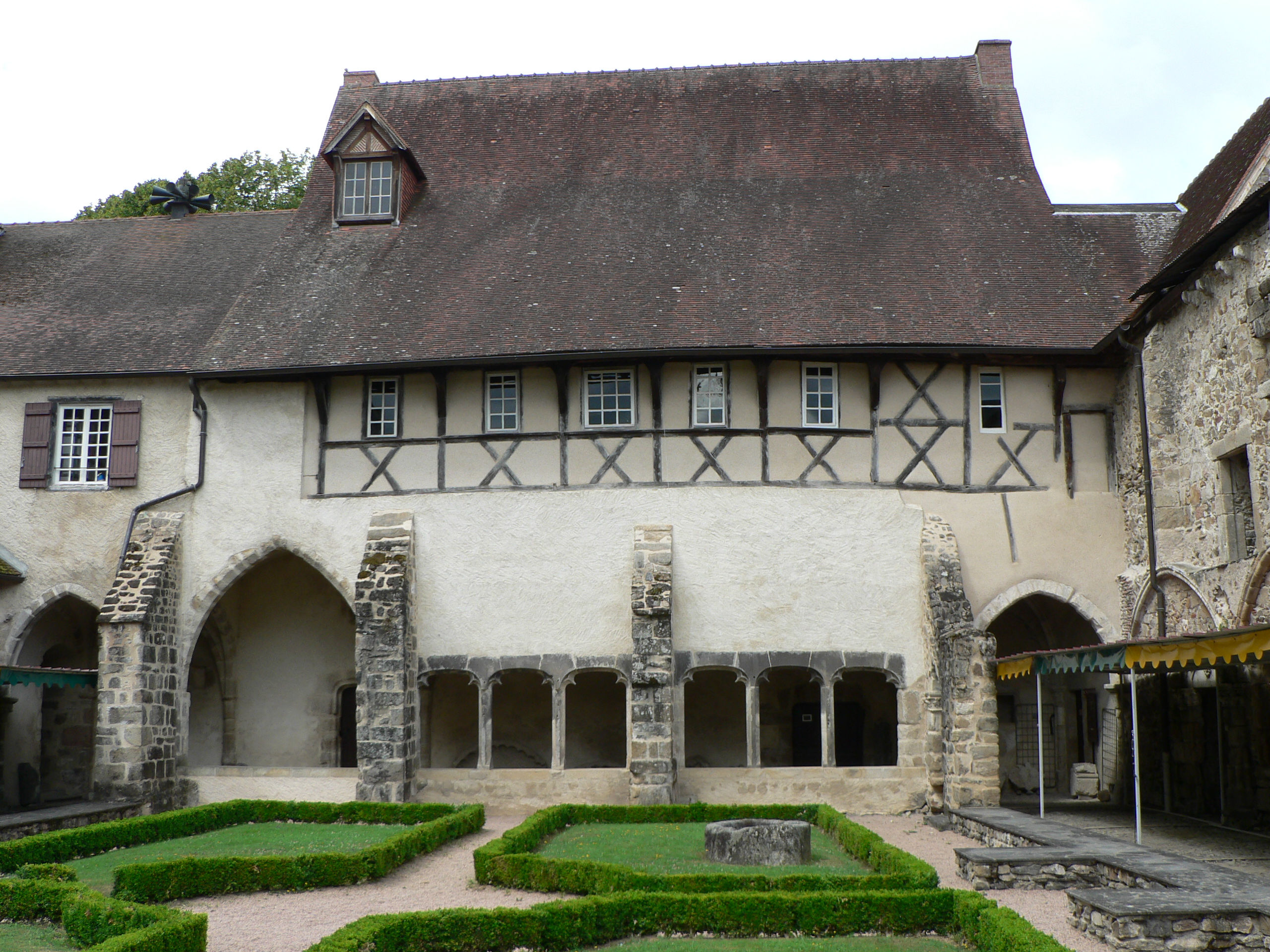 Cloître de l'abbaye de Menat (Puy-de-Dôme, France).